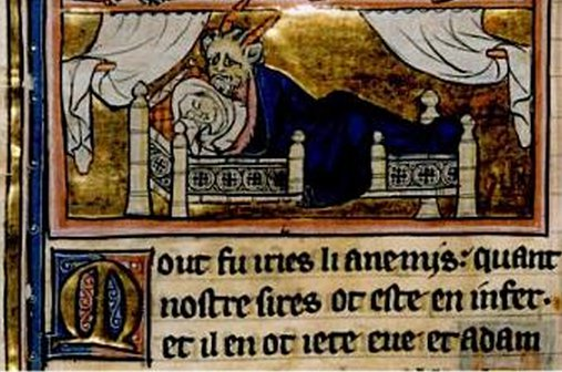 L'assemblée des démons, conception de Merlin. Manuscrit français du Merlin de Robert de Boron, XIIIe, bibliothèque nationale de France